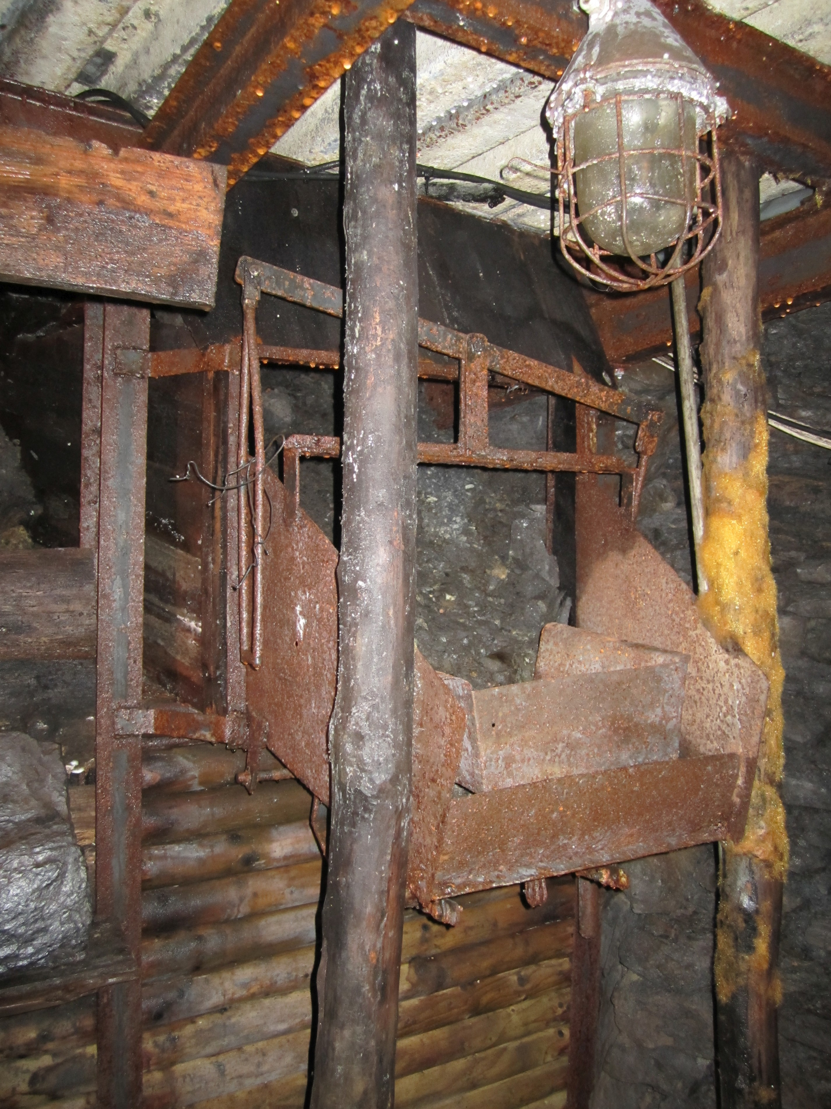 Rollenschnauze im Besucherbergwerk Rabensteiner Stollen. Netzkater, Thüringen, Deutschland.